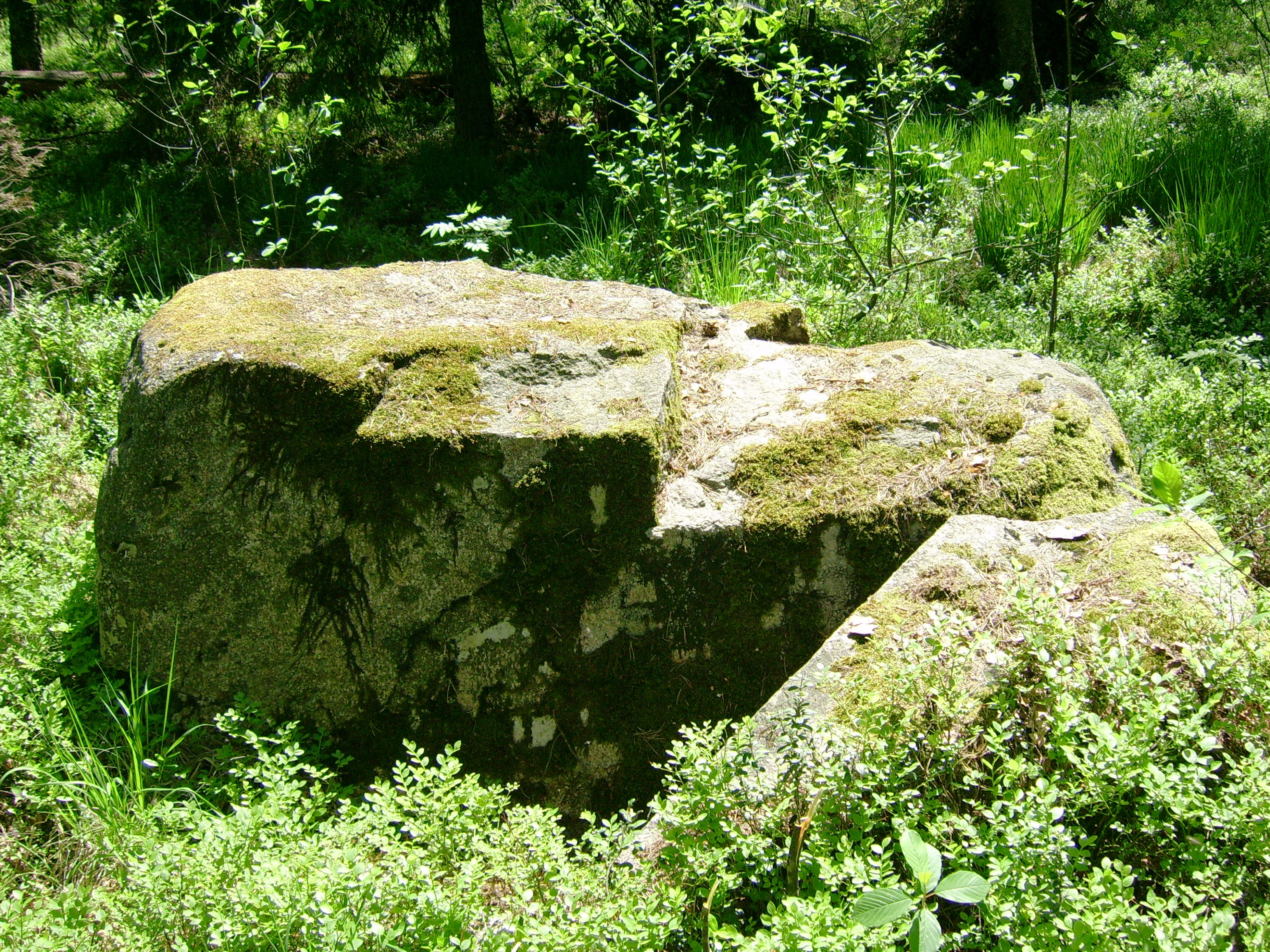 Velnio stalas – mitologinių akmenų grupė Mažonų seniūnijoje